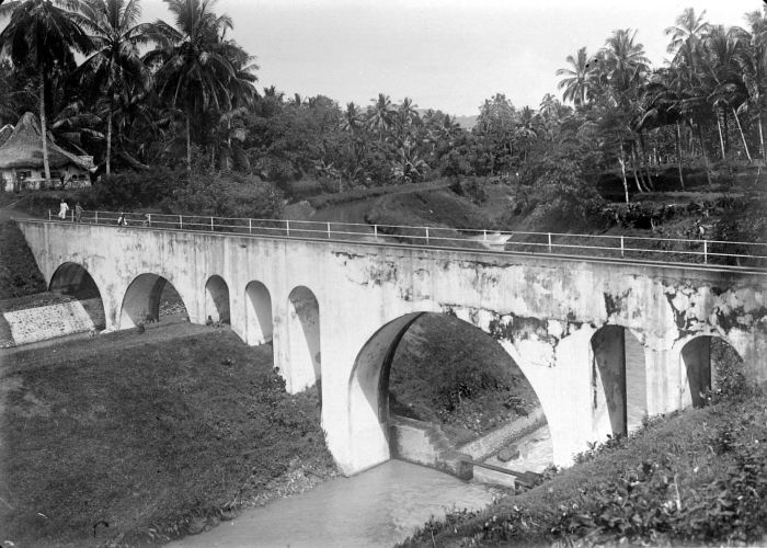 Repronegatief. Stenen aquaduct Parakan-Tjanggal over Blimbing-Siwoeloeleidingen, Bandjanegara